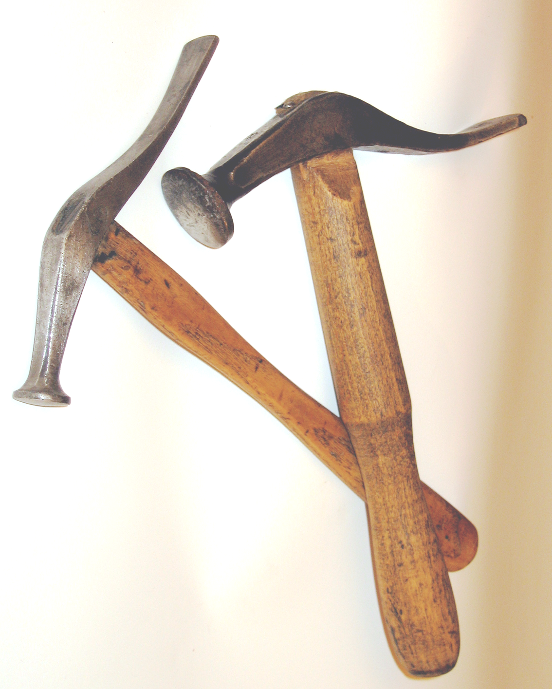 Marteaux de bottier source familiale / photo Dominique grassigli